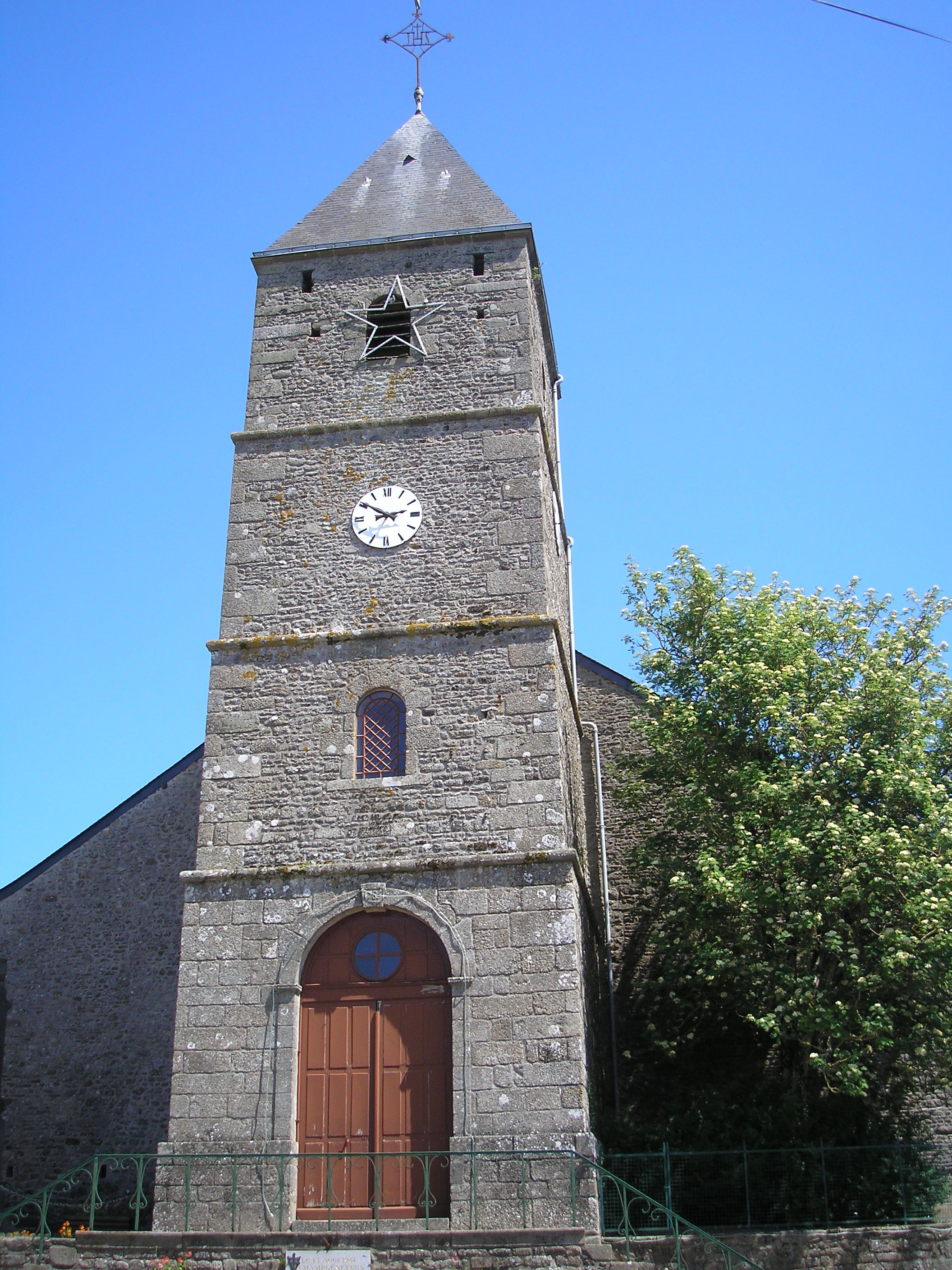 Champgenéteux (Pays de la Loire, France). L'église Saint-Gervais-et-Saint-Protais.